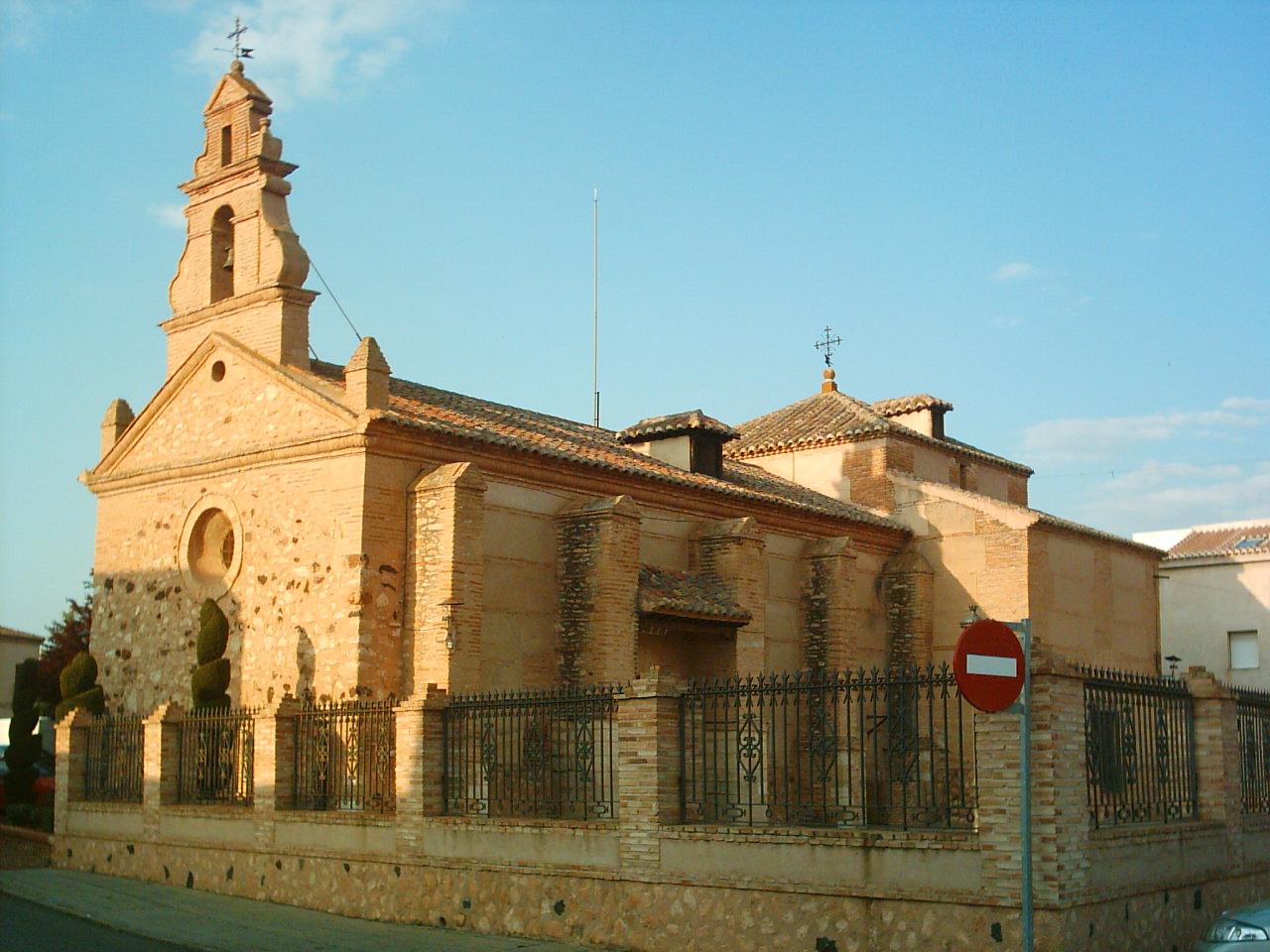 Iglesia del Cristo de la Columna